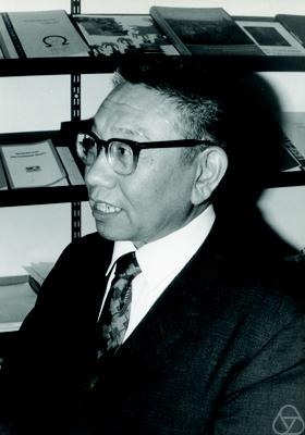 Foto di Ki Fan